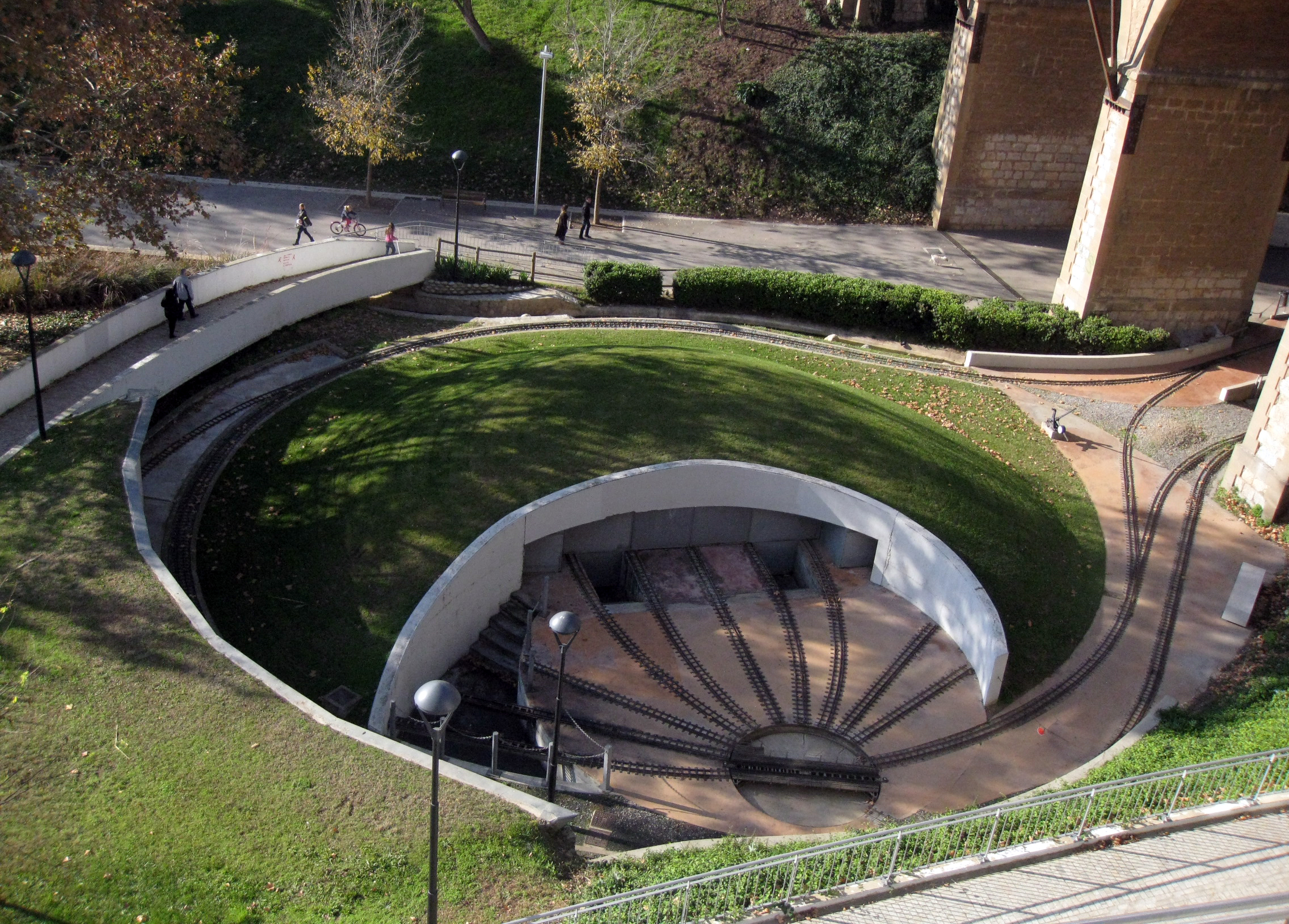 Parc de Vallparadís (Terrassa). La via del trenet de Vallparadís, sota el pont del Passeig.